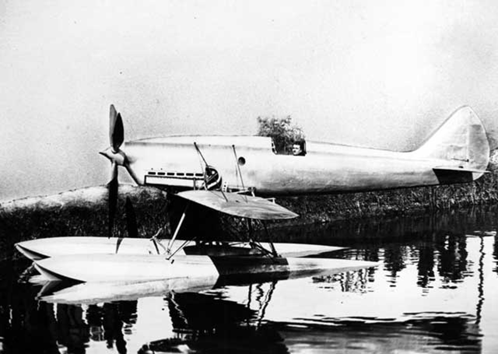 Dewoitine HD.41 tests flotteurs